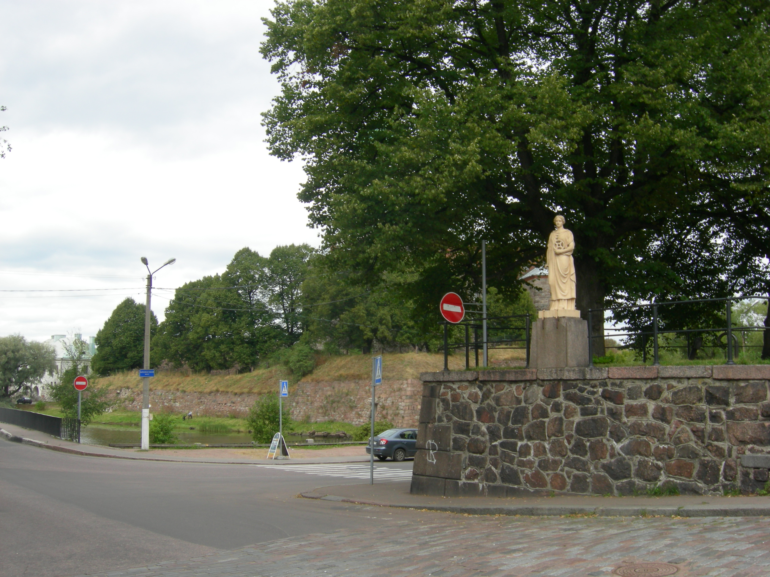 Статуя "Промышленность" (Лен.область, Выборг, Крепостная улица)